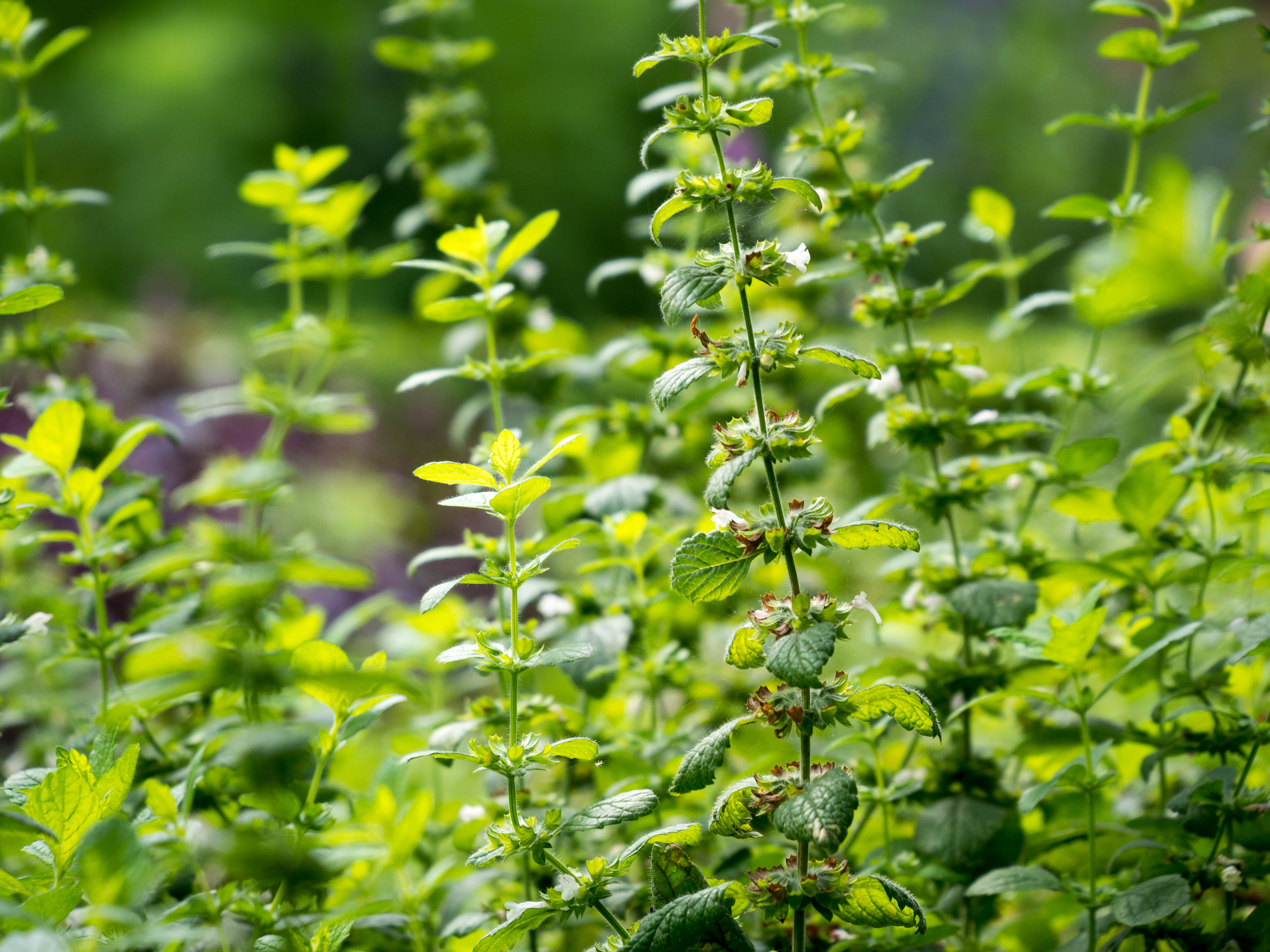 Zitronenmelisse, lat.: Melissa officinalis